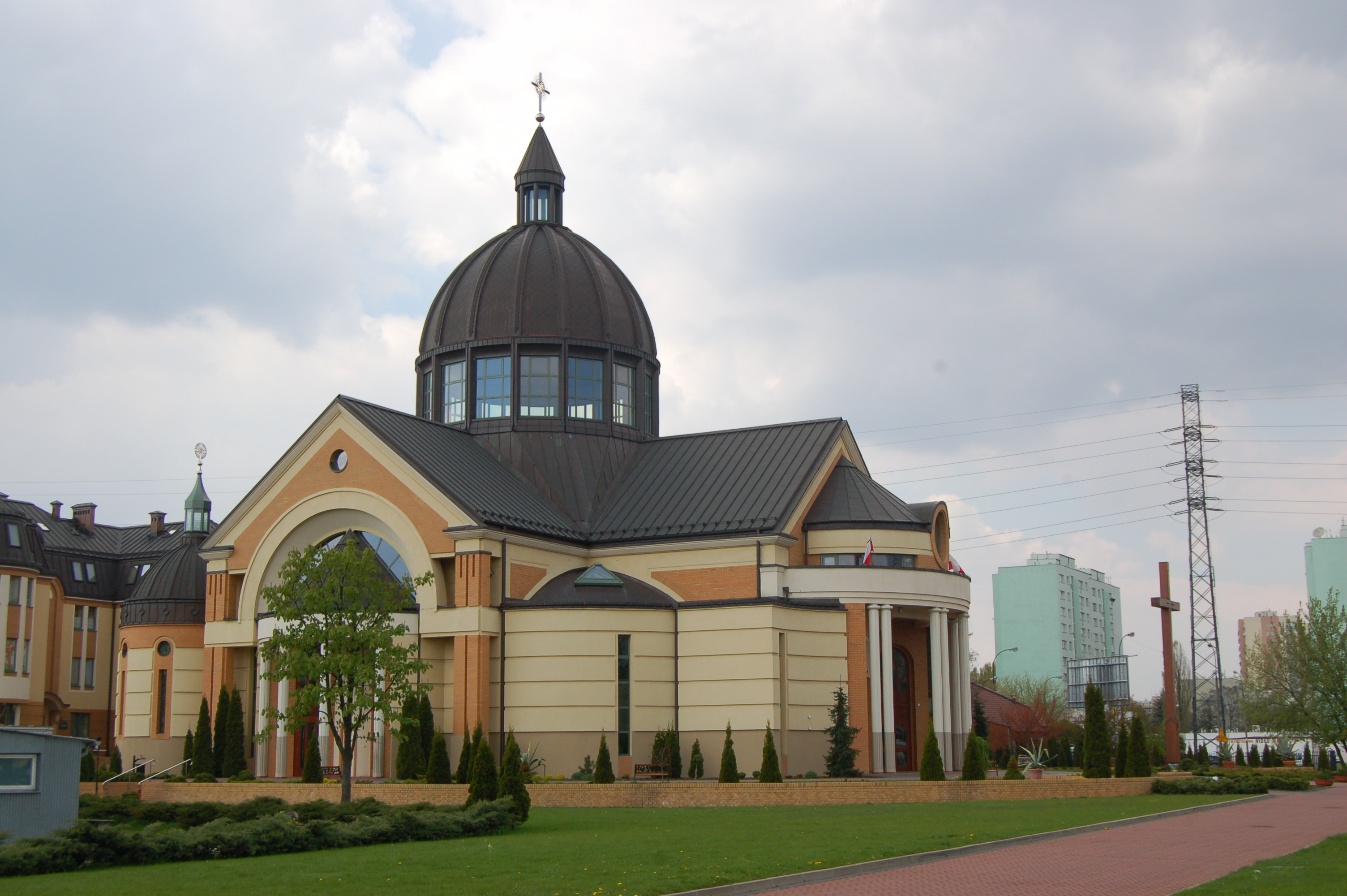 Kościół św. Antoniego Marii Zaccarii, ul. Sobieskiego, Warschau